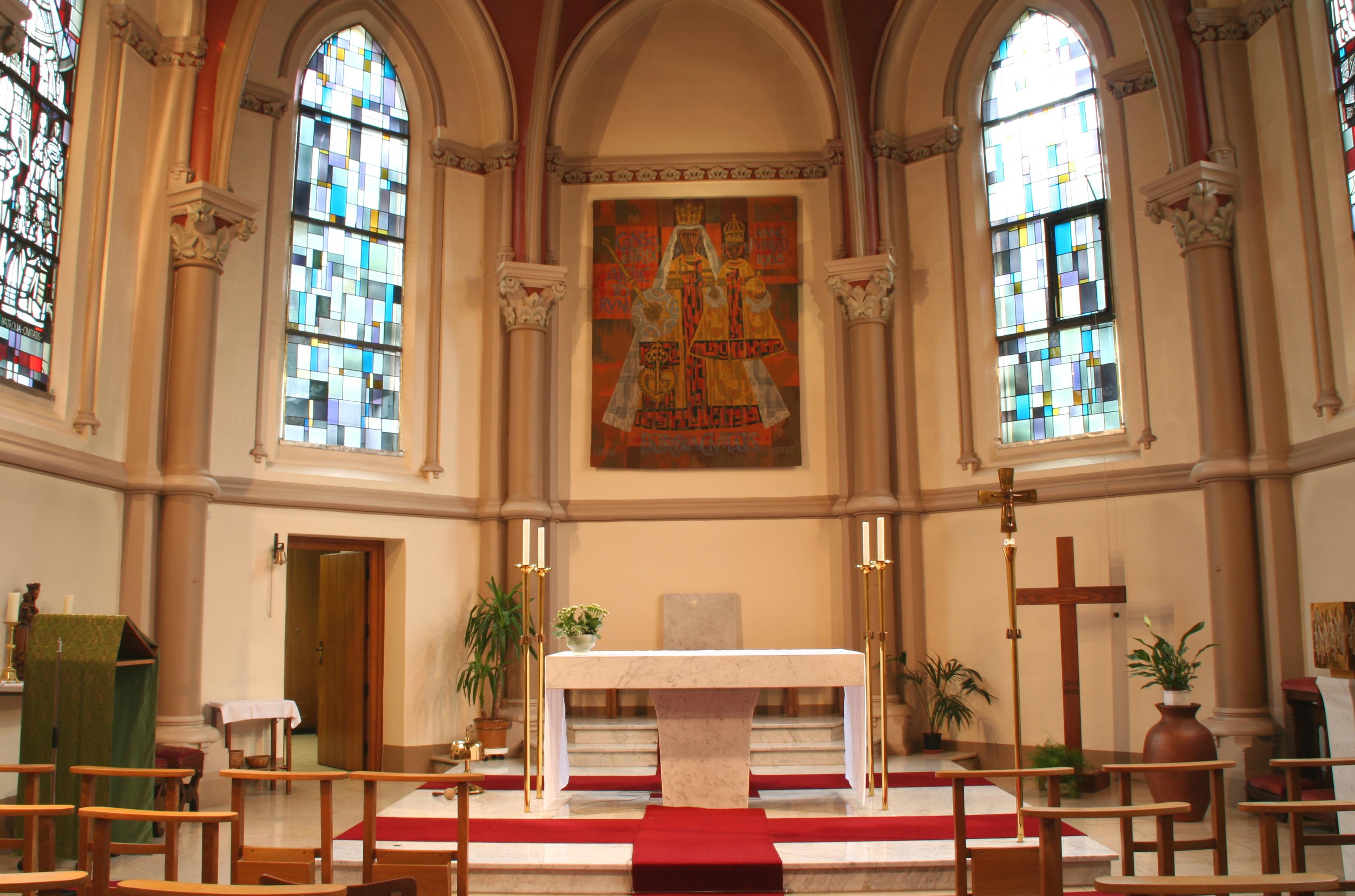 Altar der Glaciskapelle in Luxemburg-Stadt